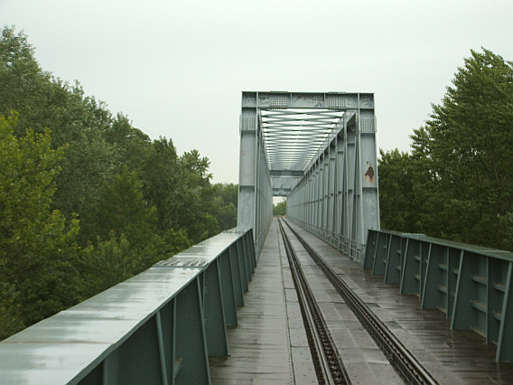 Vasúti híd Szentes és Csongrád között a Kiskunfélegyháza–Szentes–Orosháza-vasútvonalon.